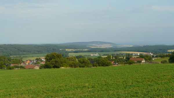 Obec Polomí s Velkým Kosířem v pozadí